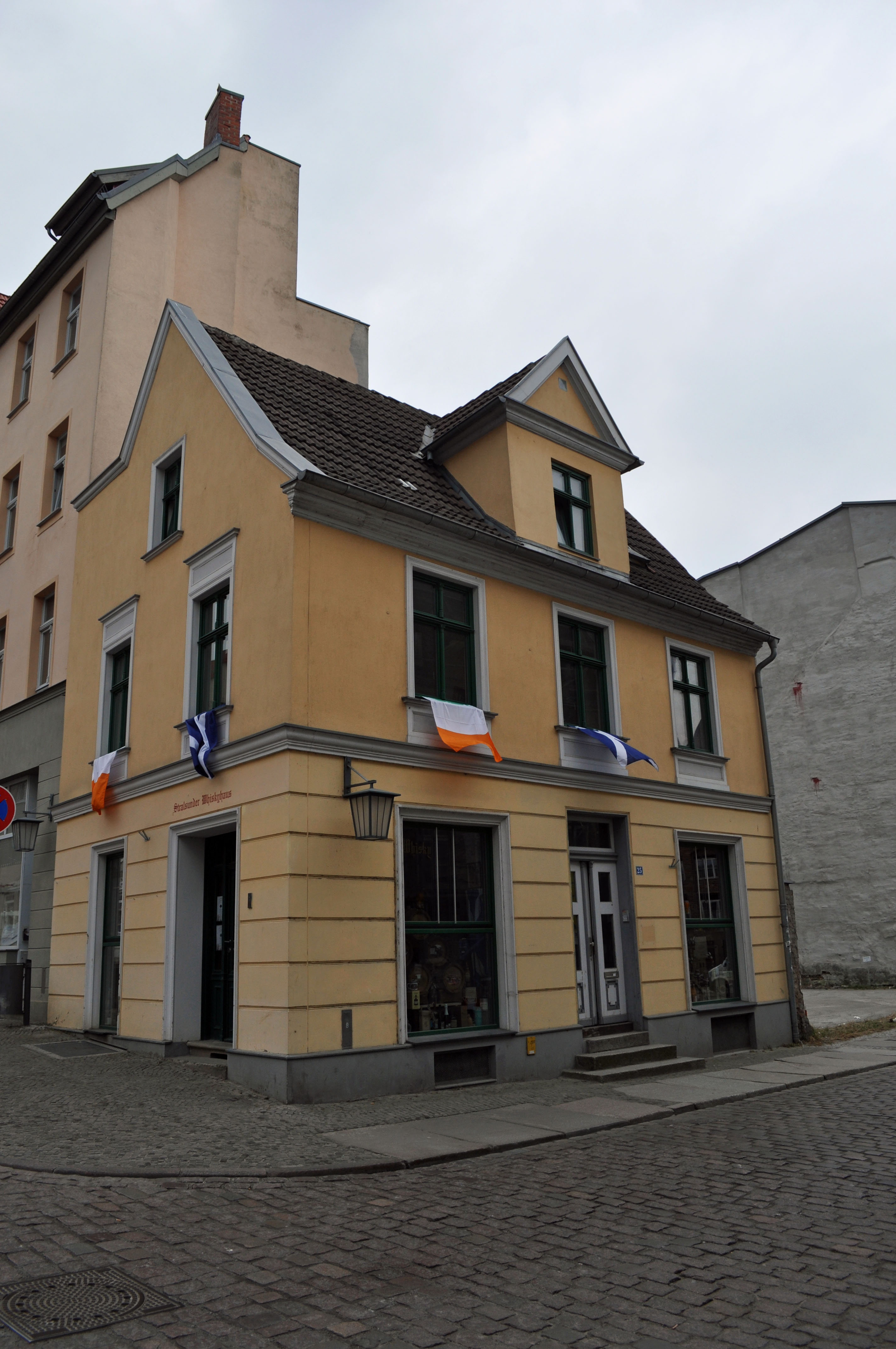 Gebäude bzw. Gebäudedetail in Stralsund. Straße und Hausnummer siehe Dateiname.